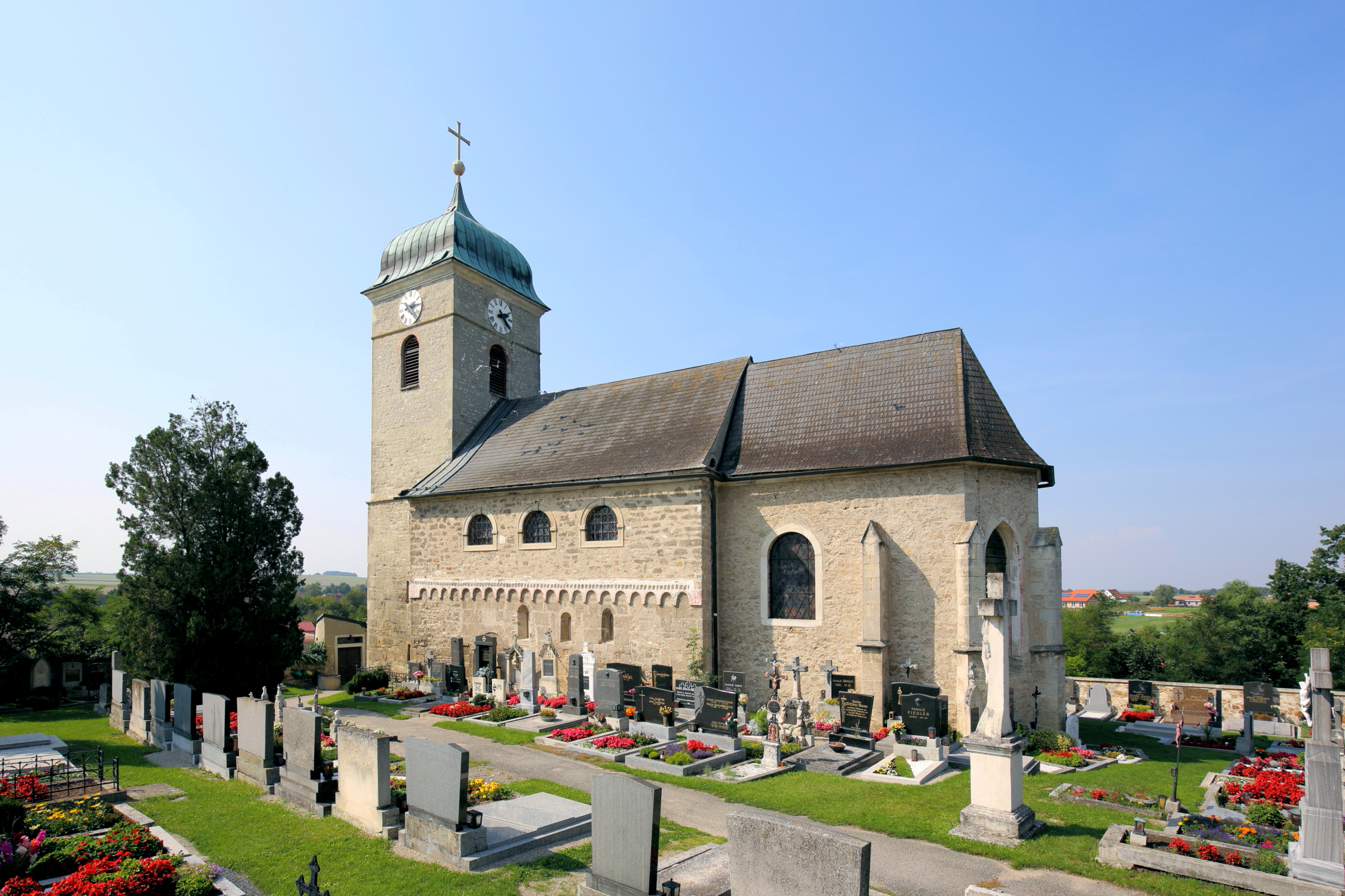 Südostansicht der katholischen Pfarrkirche hl. Michael in Burgschleinitz, ein Ortsteil der niederösterreichischen Marktgemeinde Burgschleinitz-Kühnring. Das Langhaus mit dem steinsichtigen Quadermauerwerk und Rundbogenfries aus dem 12. Jahrhundert ist romanisch und wurde von 1728 bis 1732 barockisiert. Der vorgestellte Westturm ist spätgotisch und der eingezogene frühgotische Chor wurde Ende des 13. Jahrhunderts errichtet.